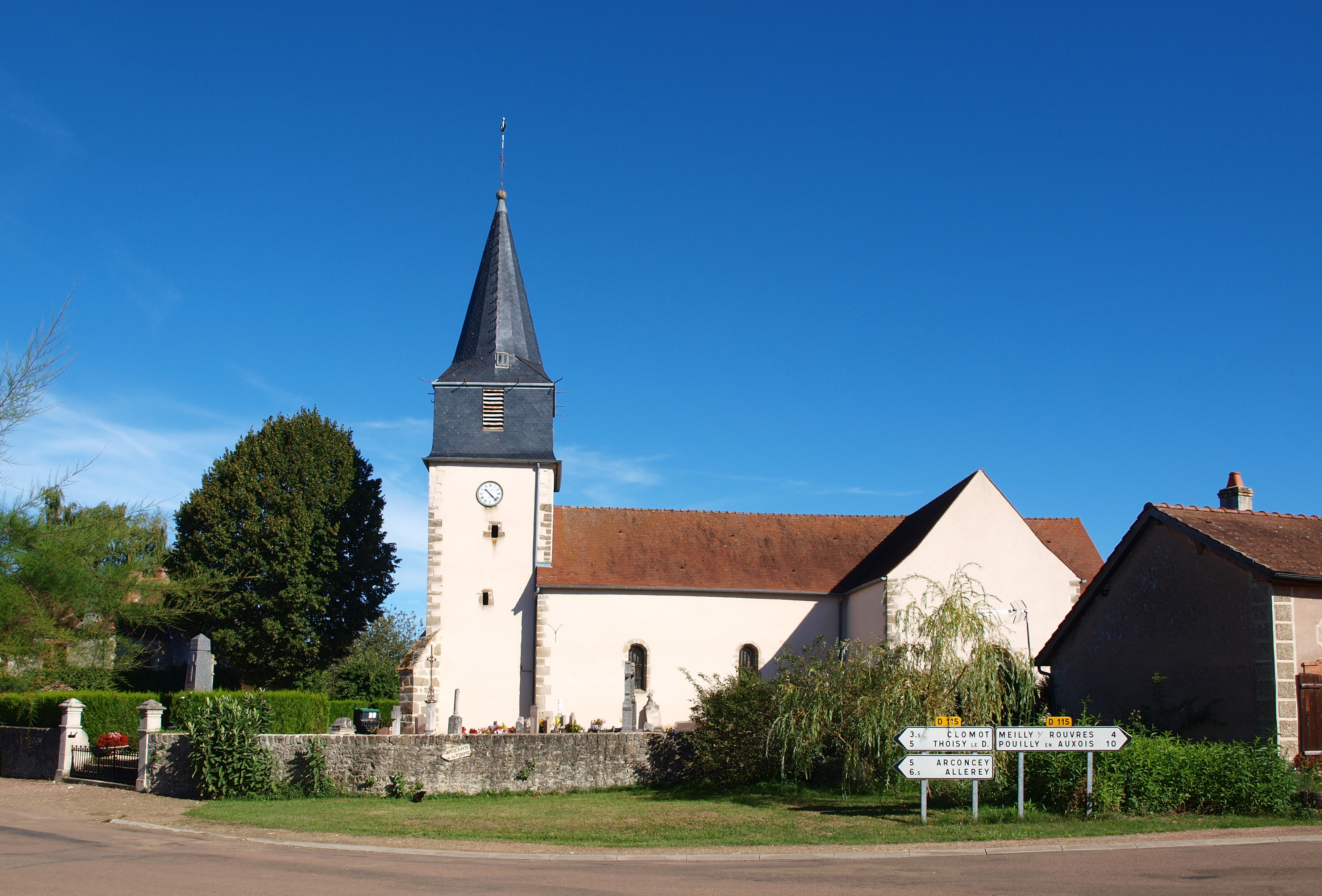 Essey (Côte-d'Or, France) ; église